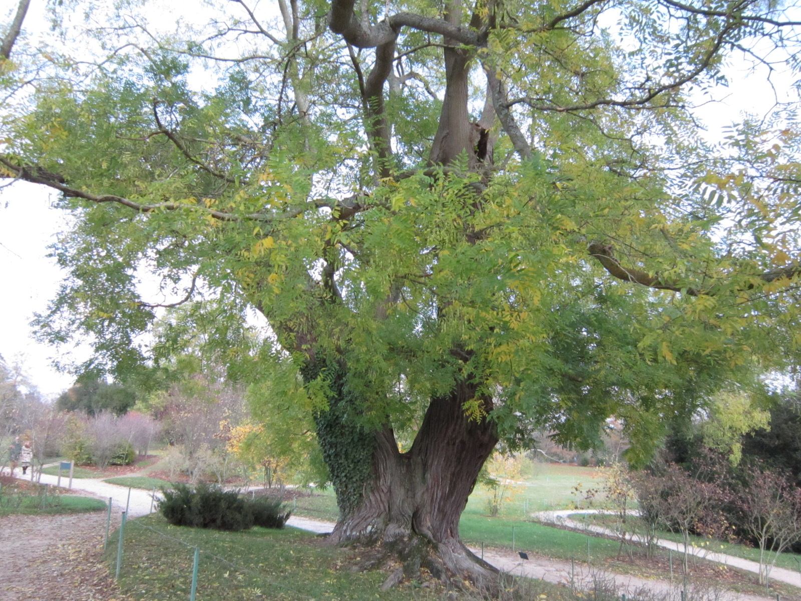 Sophora, parc du petit Trianon, Versailles